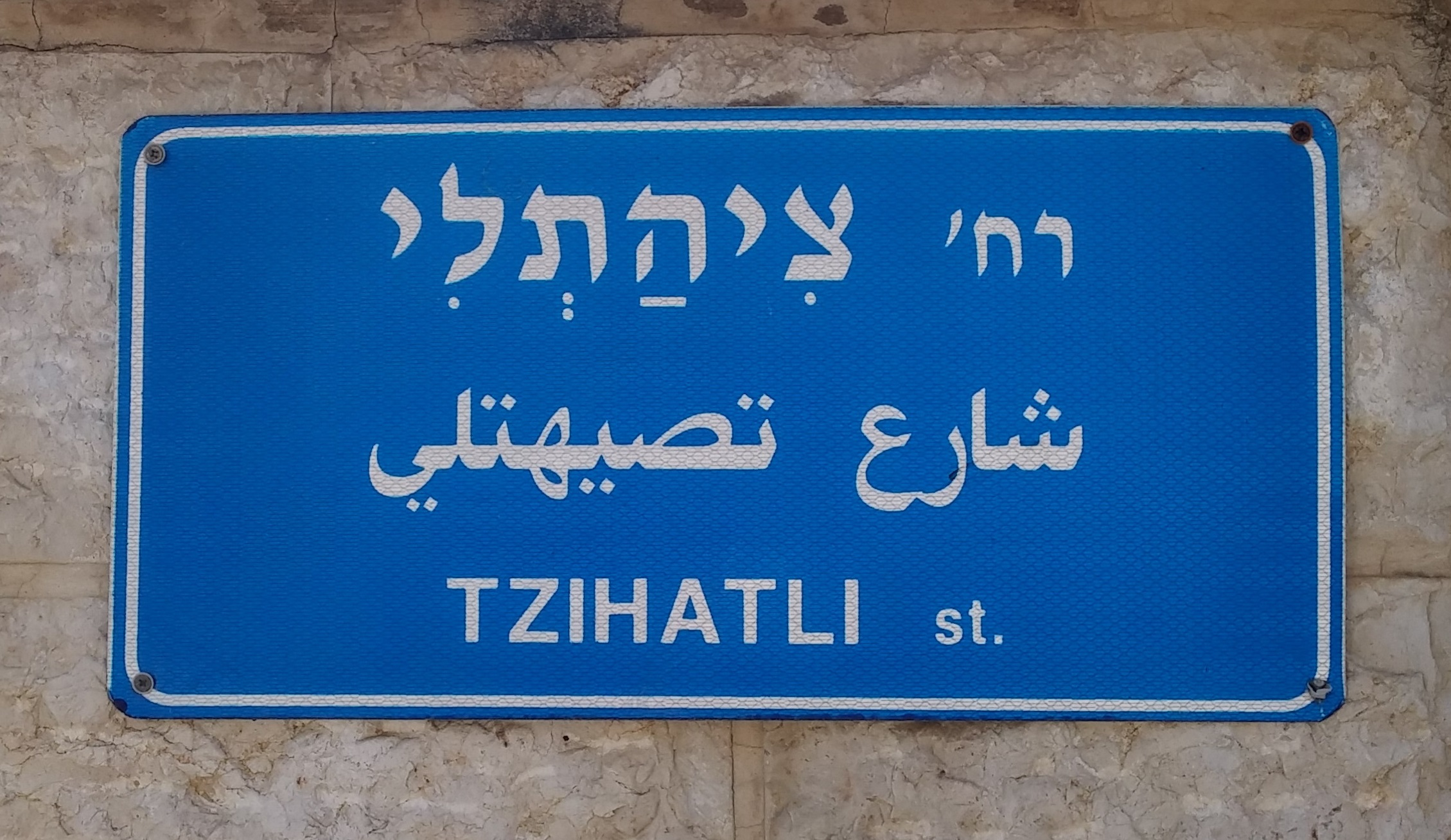 רחוב ציהתלי ביפו